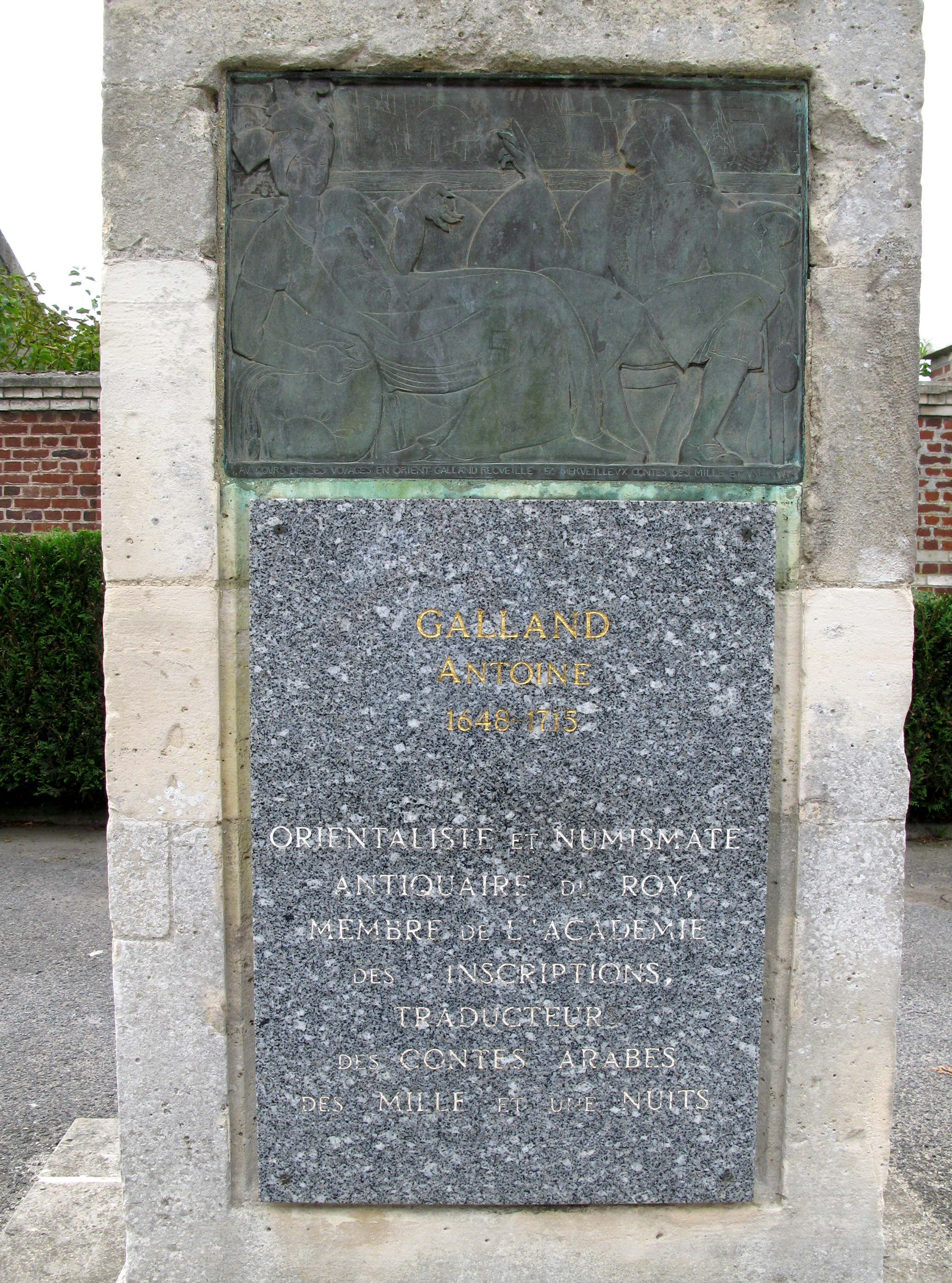 Rollot (Somme, France) - Base de la statue de Antoine Galland. .